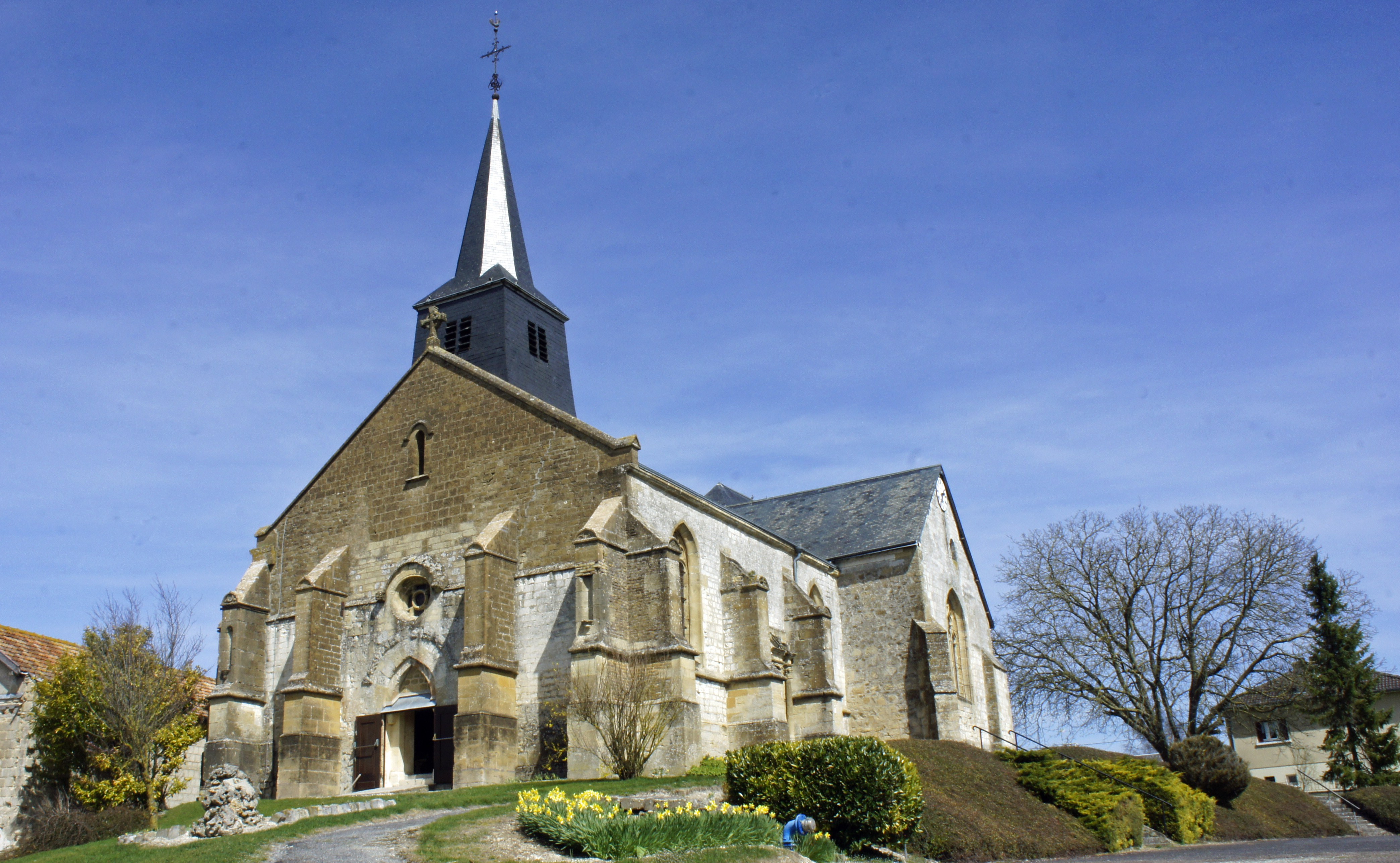 Vue de l'église et du tertre où elle est érigée, plus de trace de cimetière autour .